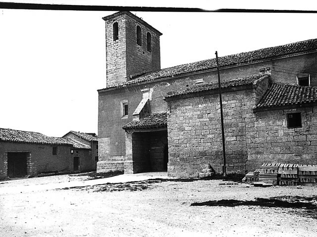 Iglesia parroquial de la Asunción - Casasola de Arión (Valladolid) - Vista lateral. - Fotografía. Papel 119 x 88 B/N